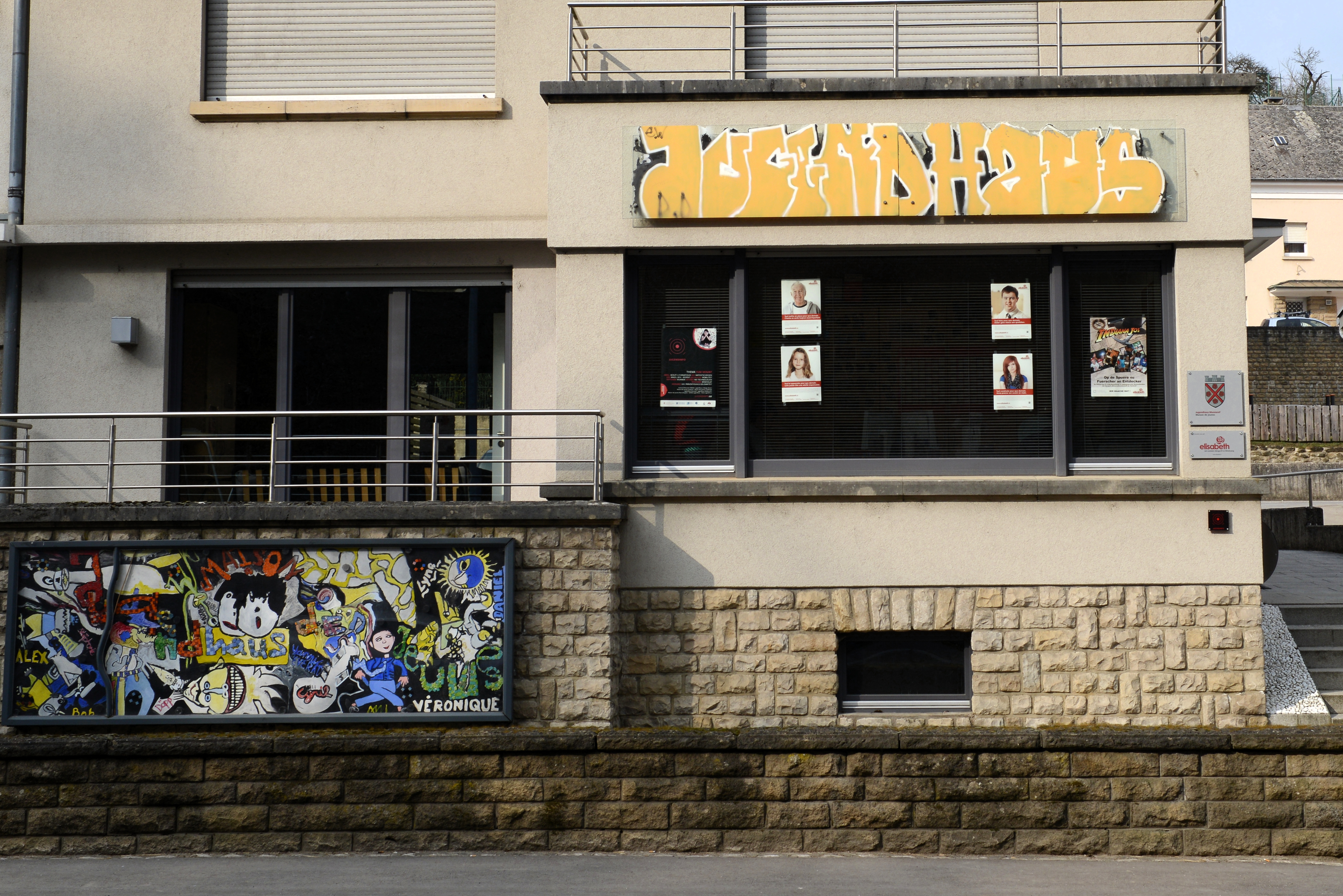 D'Jugendhaus op der Lëtzebuergerstrooss zu Munneref.